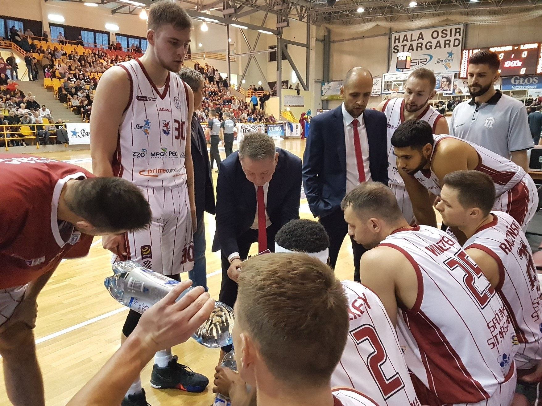 Spójnia Stargard (17.11.2018)